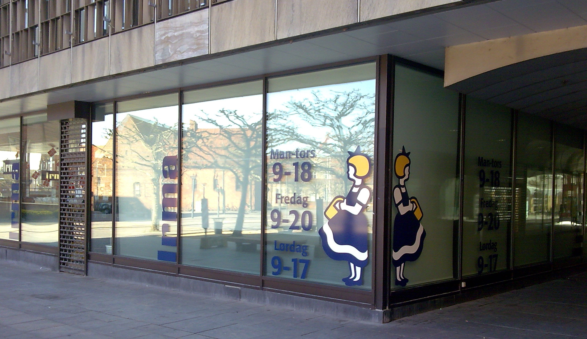 Irma supermarket in Odense, Denmark